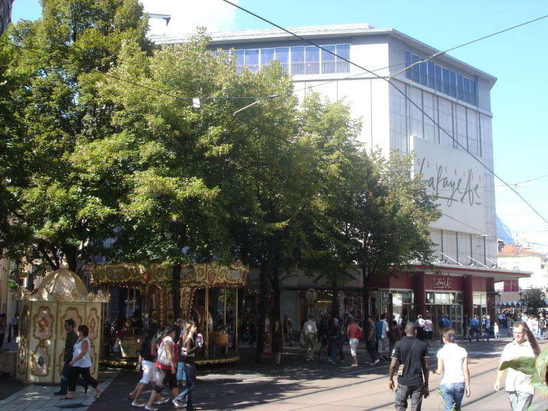 rue Félix Poulat